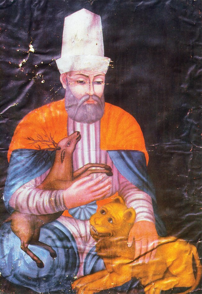 Средневековая миниатюра на обложке книги Бахауддин Валад ""Утопленная книга. Размышления Бахауддина, отца Руми, о небесном и земном = Маариф"". — М.: Эннеагон Пресс, 2009. — 280 с. — 3,000 экз. — ISBN 978-5-91051-033-7